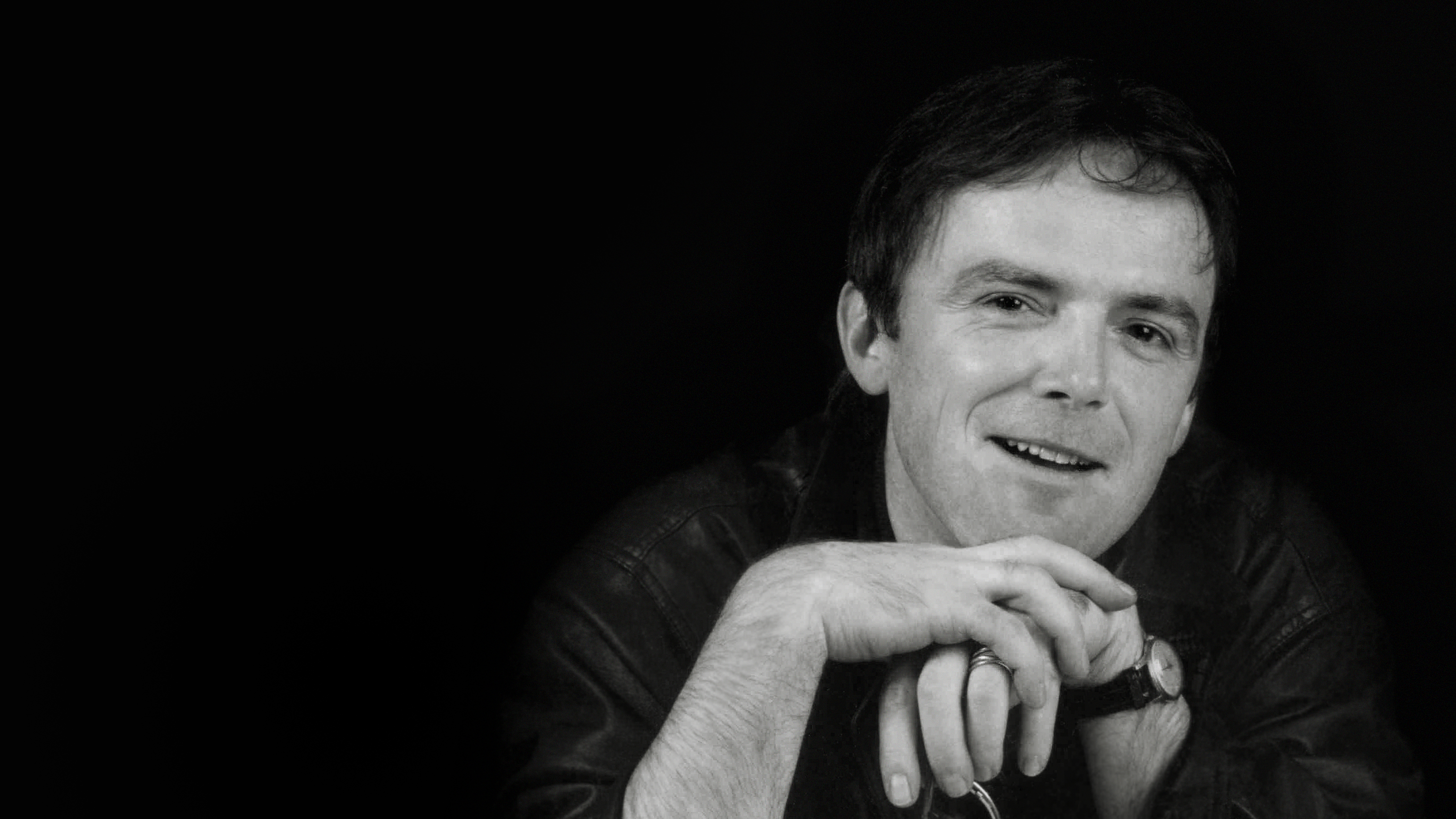 Marek M. Gasztecki